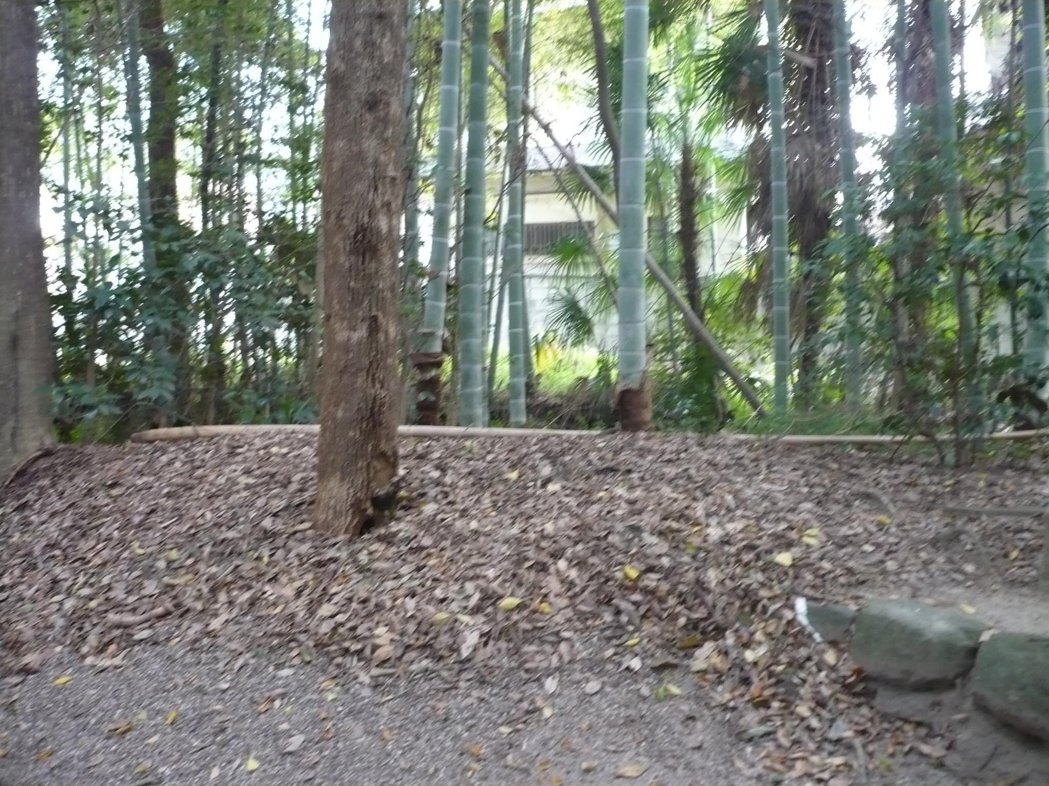 土塁跡